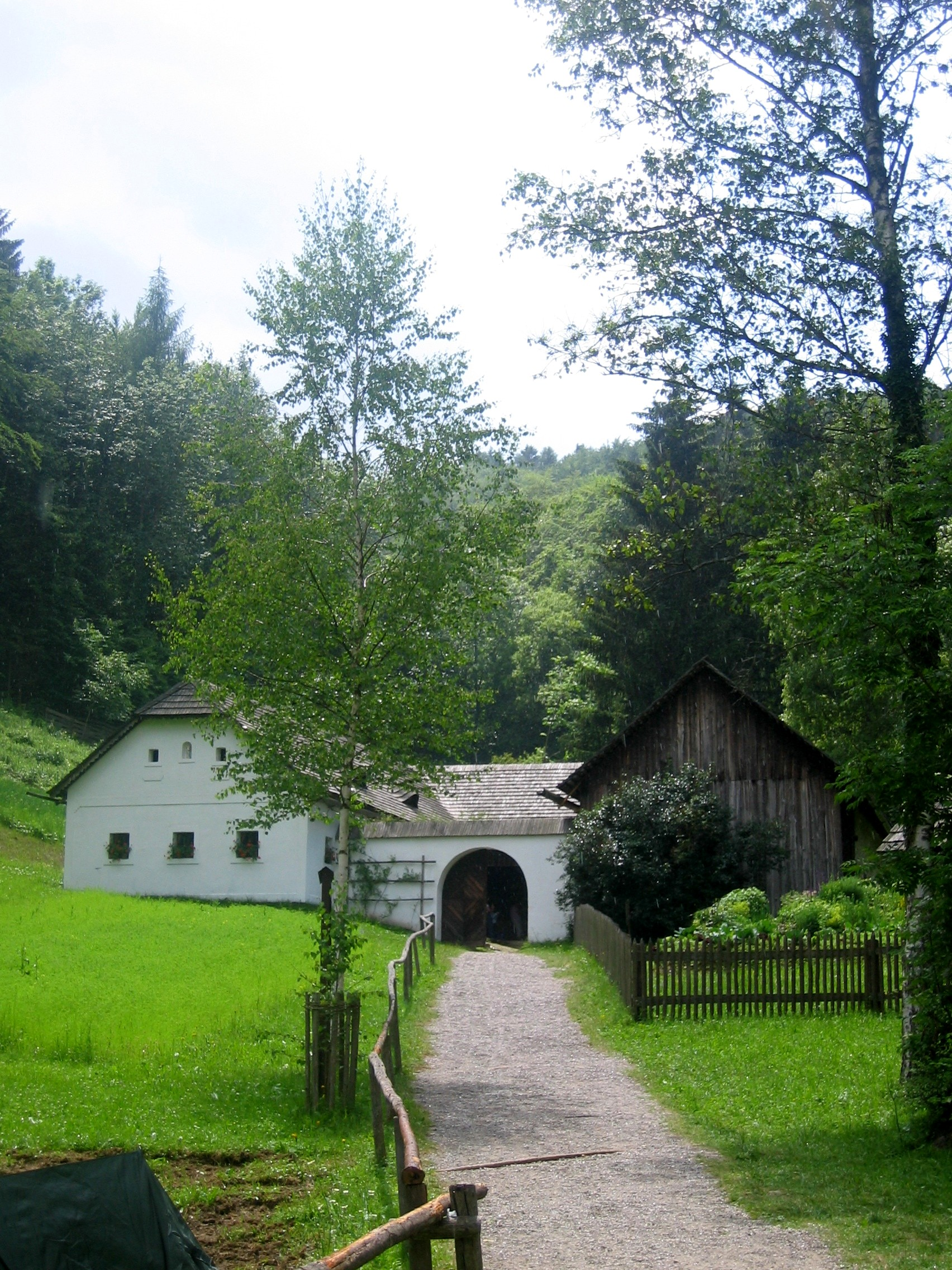 Dreikanthof im Österreichischen Freilichtmuseum in Stübing, Österreich